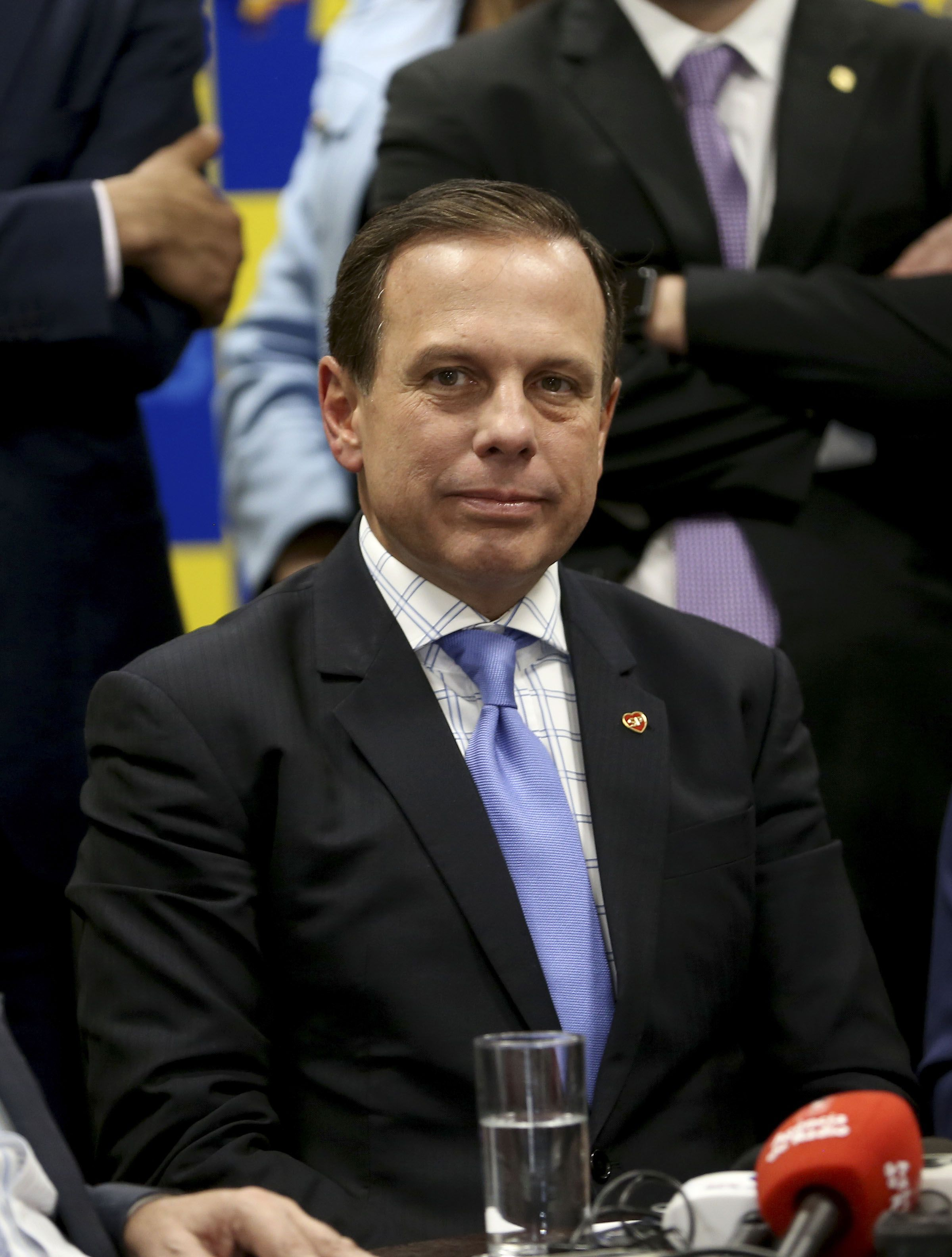 A bancada do PSDB na Câmara se reúne em Brasília com o prefeito de São Paulo, João Doria